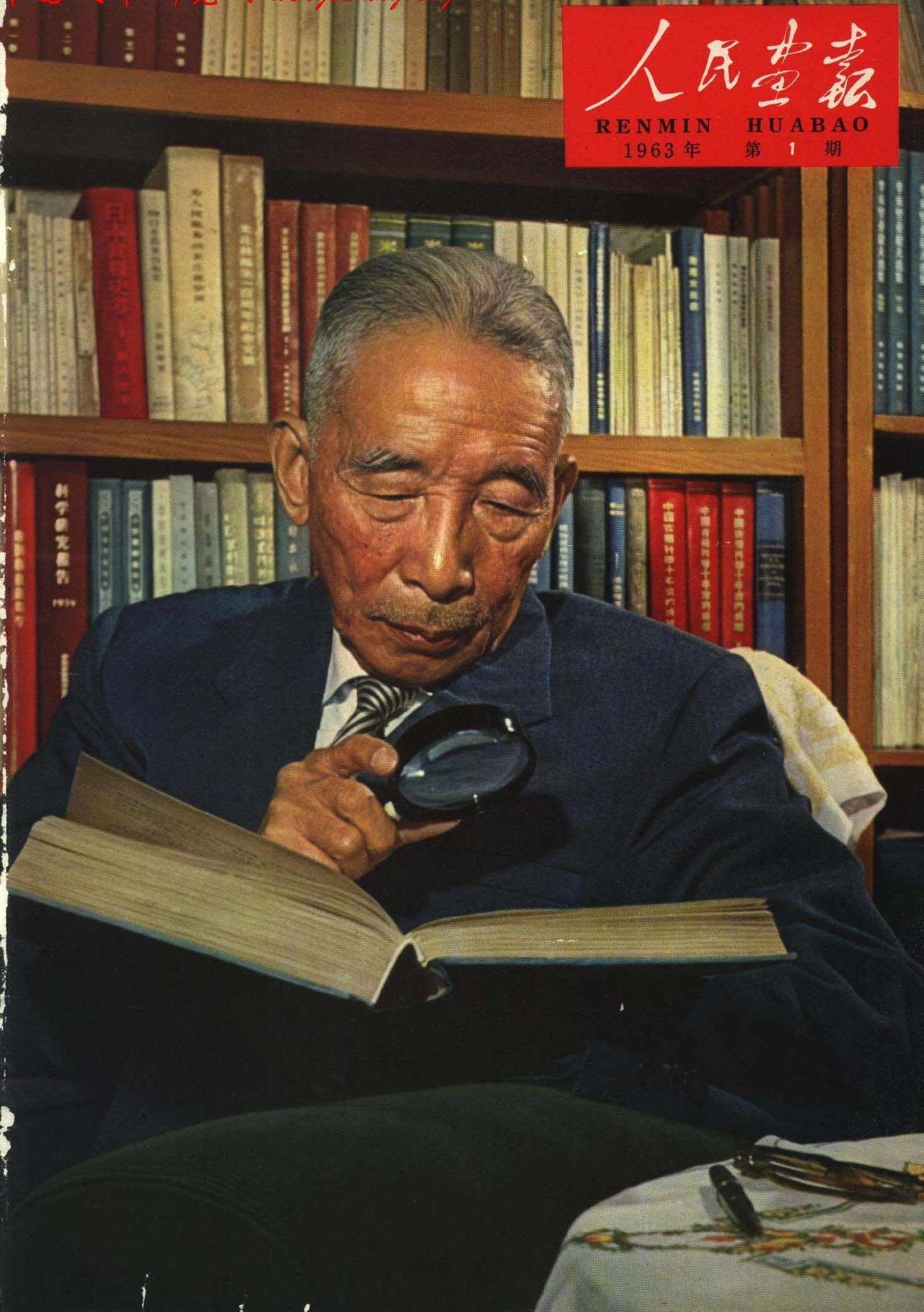 1963-01 中国农业科学院 丁颖